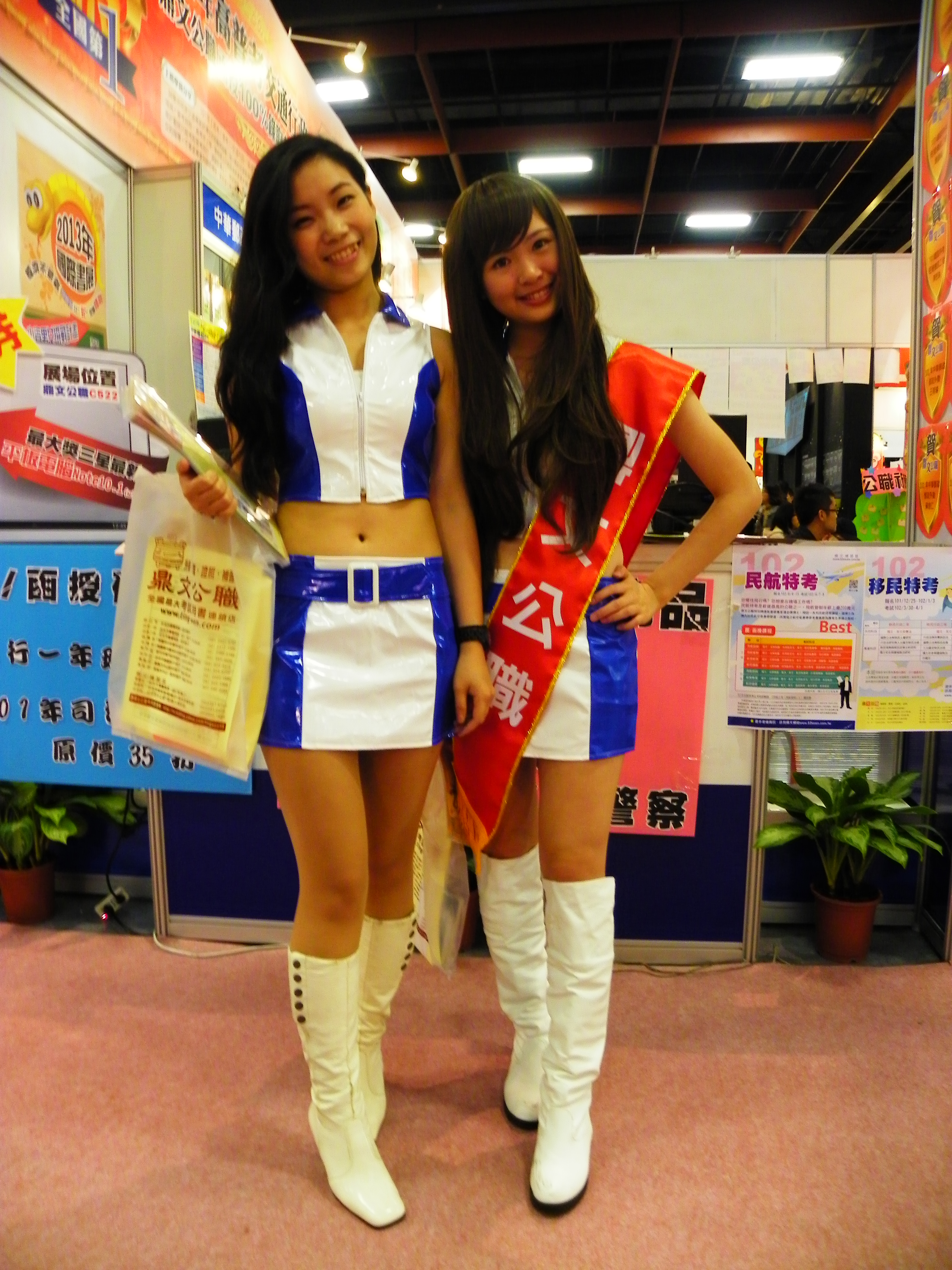 2013年臺北國際書展，世貿一館鼎文書局與鼎文文理補習班攤位宣傳女郎。